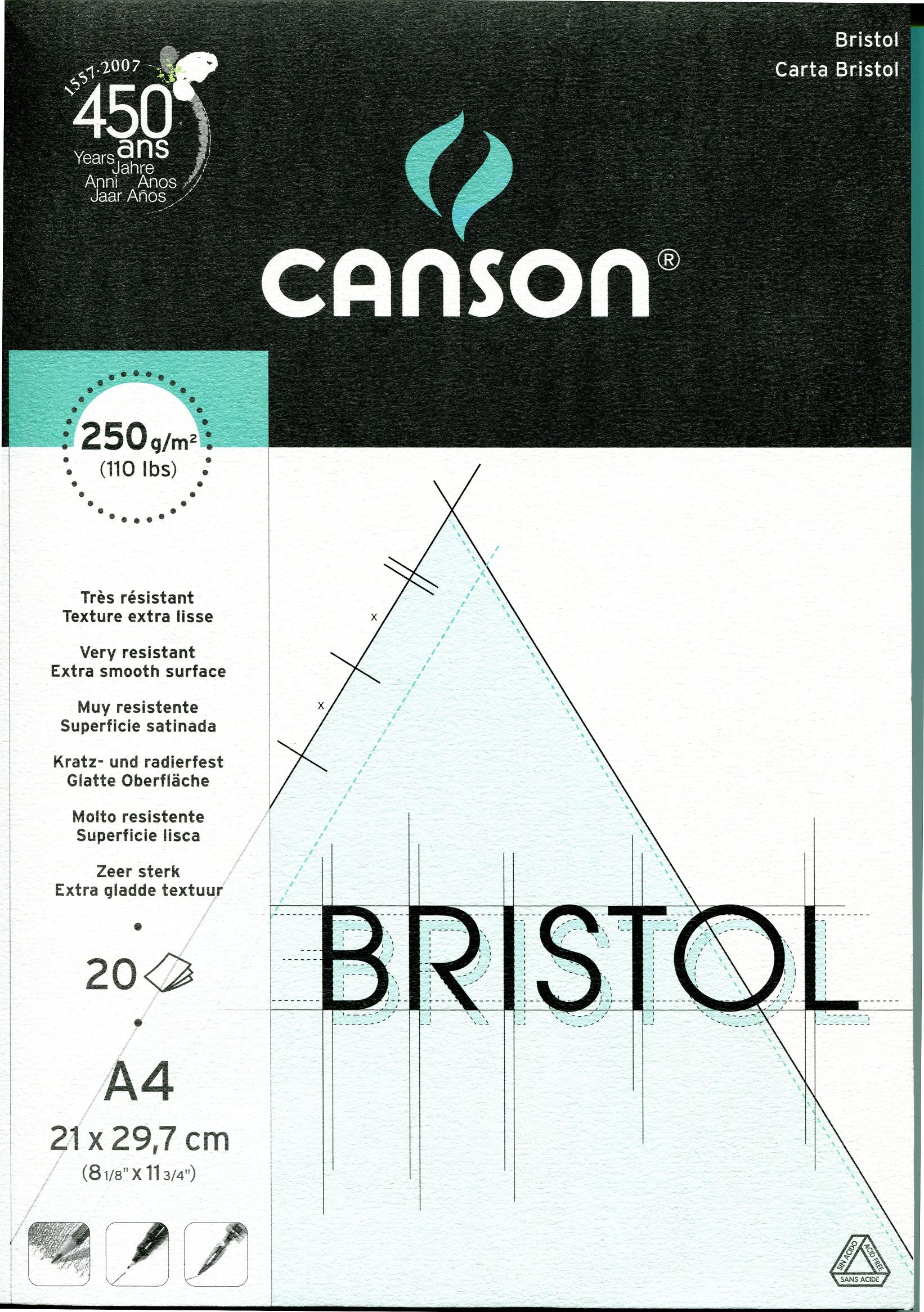 photographie d'une des déclinaisons offertes à la vente par la firme Canson sous le nom de Bristol